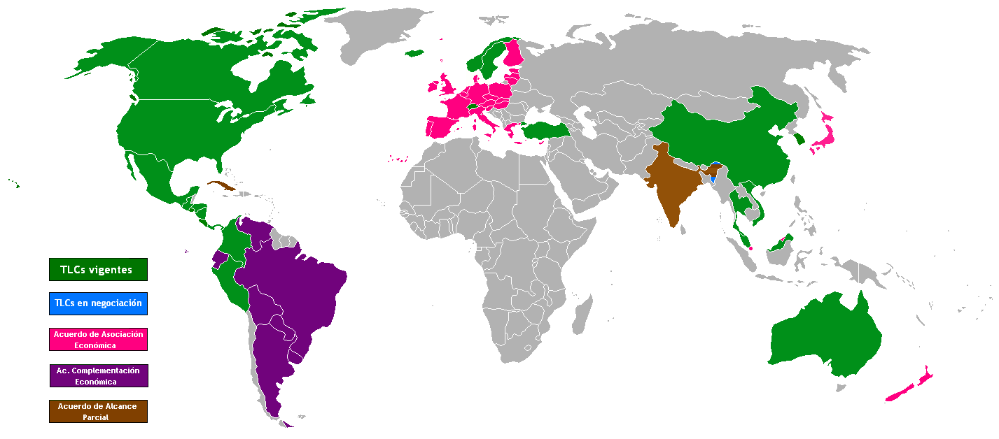 Acuerdos economicos de Chile